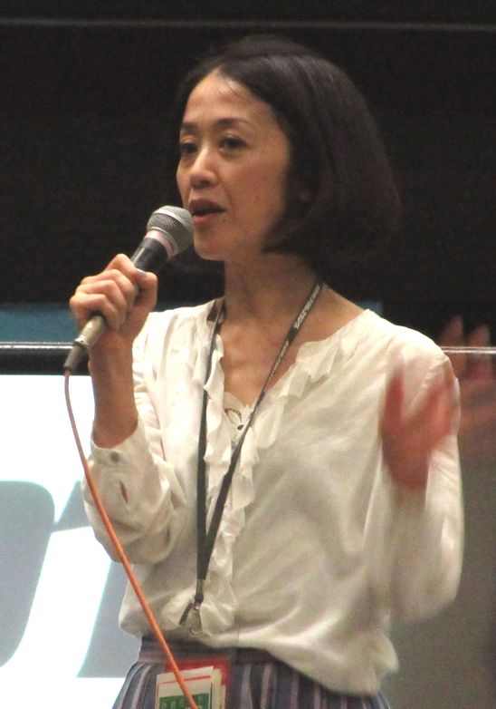 2,016年大阪